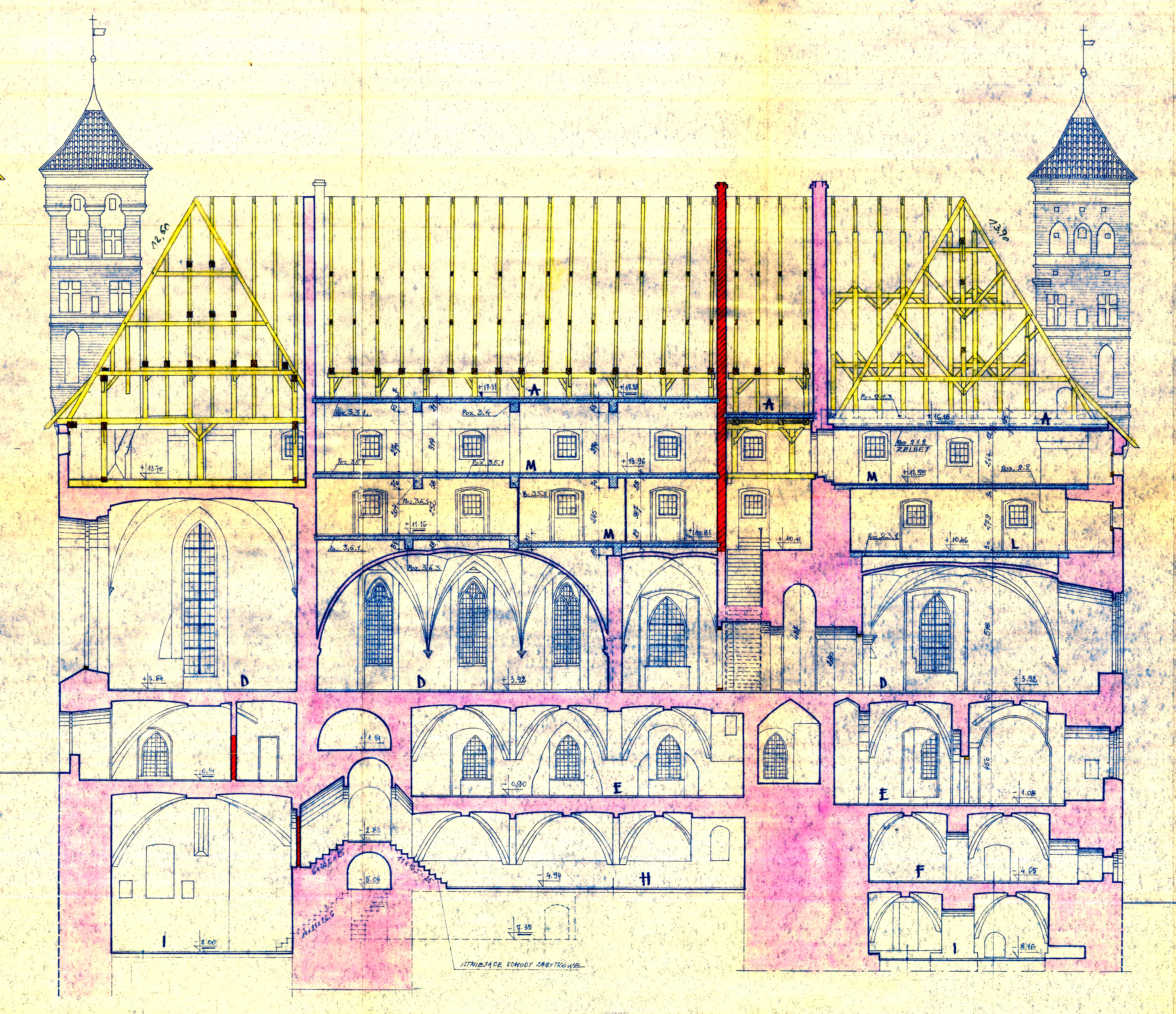 Rysunek z projektu restauracji i adaptacji zamku na muzeum